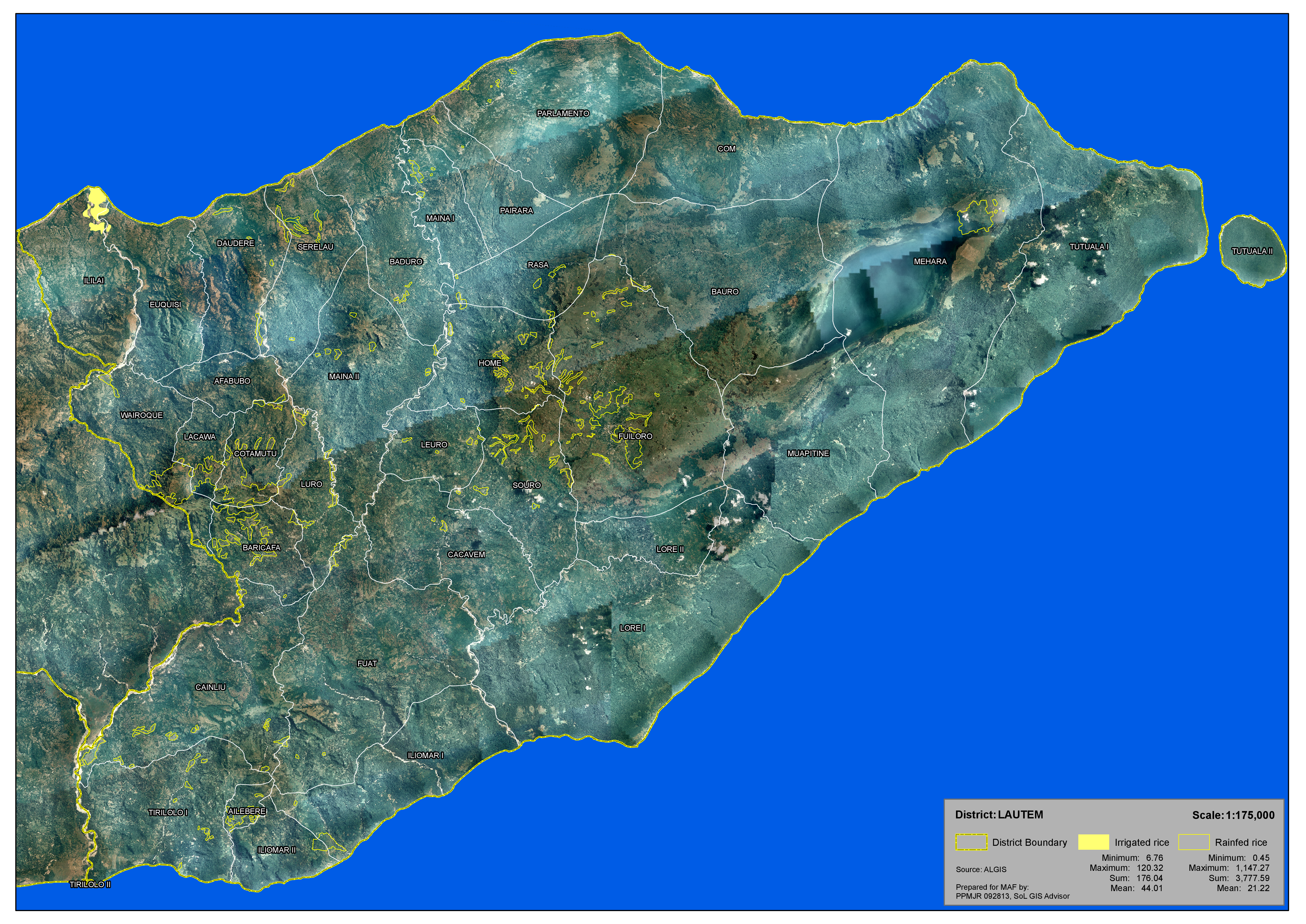 Reisfelder im Distrikt Lautém